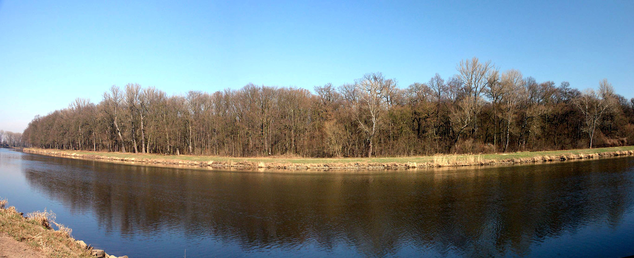 PP Jiřina